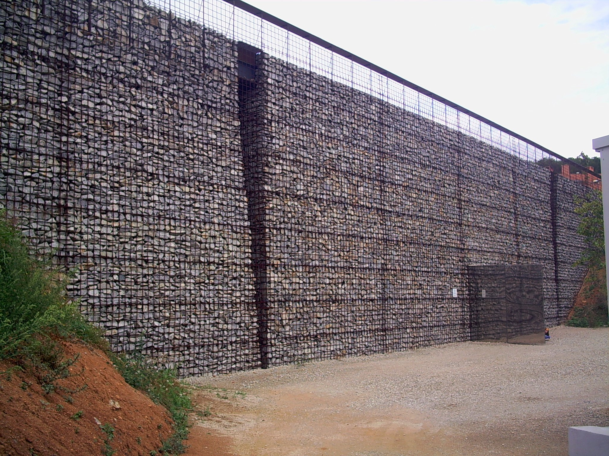 Recinte exterior, dissenyat per l'arquitecte Toni Gironès. Forns romans de la Fornaca, a Vilassar de Dalt, el Maresme, (Catalunya).